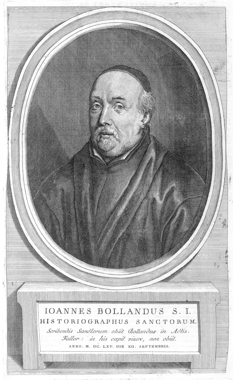 Jean Bolland (1596-1665). Grabado calcográfico de Richard Collin firmado en Amberes, 1667. Hay ejemplar en el Riksmusuem